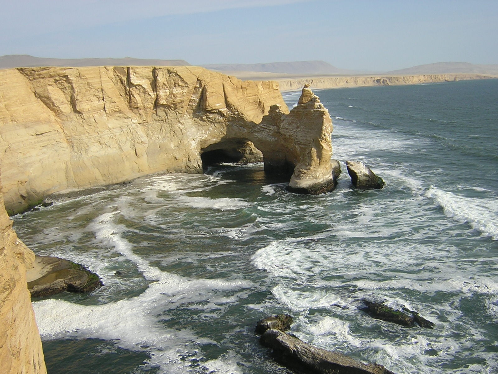 La Catedral en la reserva nacional de Paracas, Peru, antes del terremoto.